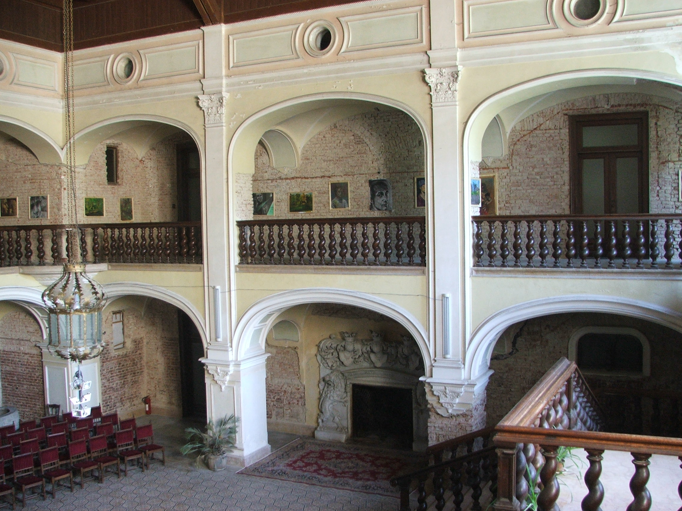 Nagykároly, Károlyi-kastély, aula